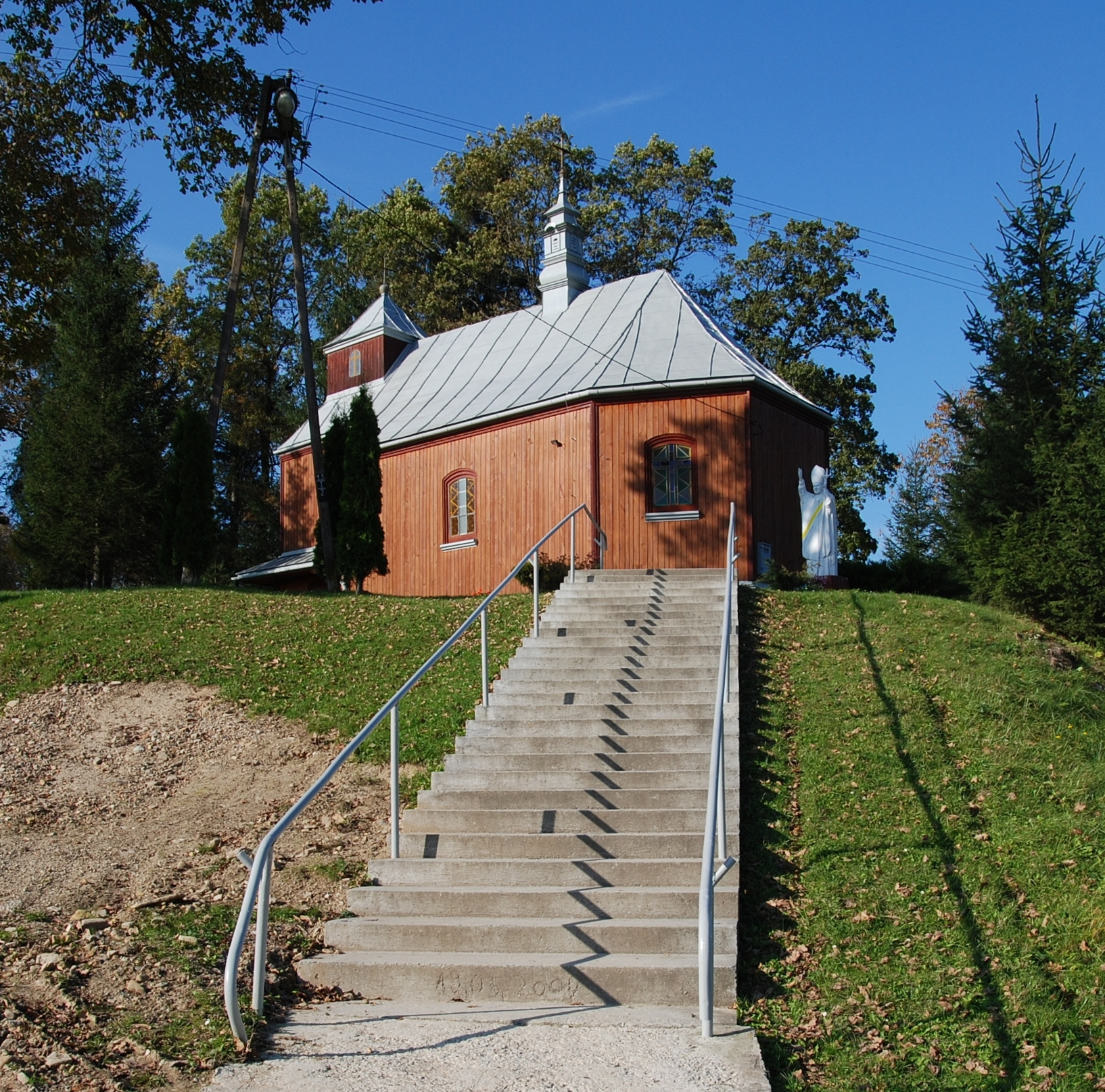 wieś Rudawka